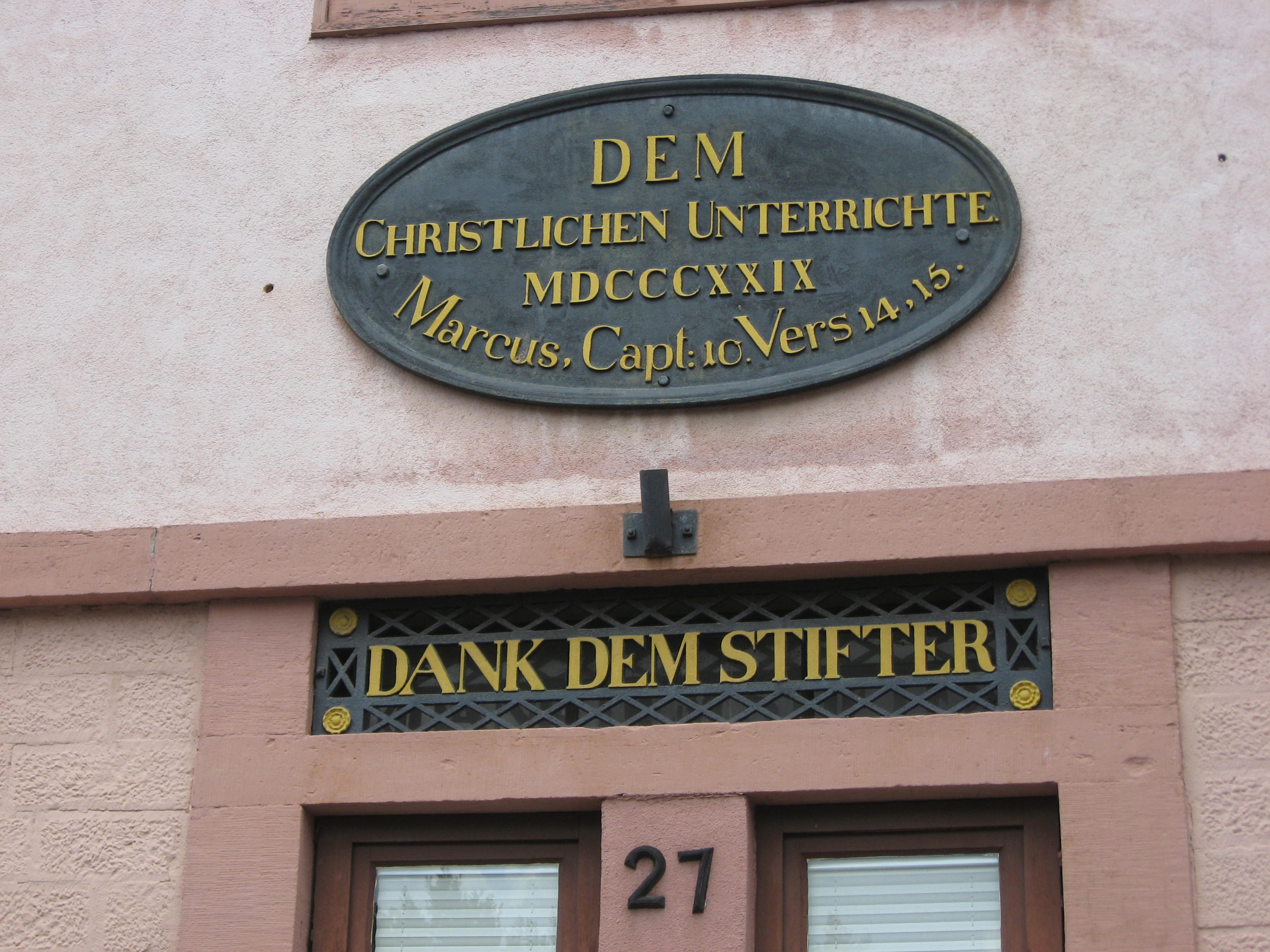 Widmungsinschrift am ehemaligen Schulhaus, Schloßstraße 27 in Steinbach; bezeichnet 1829 mit Hinweis auf die Bibelstelle: Lasset die Kindlein zu mir kommen und wehret ihnen nicht ...